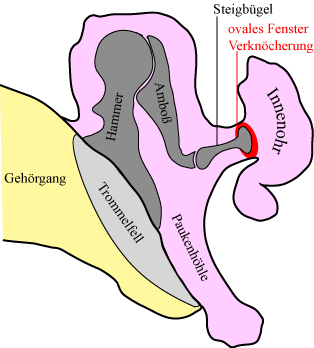 Mittelohr nachbearbeitet und Beschriftung modifiziert (Deutsch/german) von Patrick]